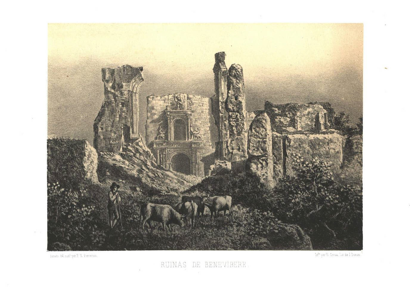 Ruinas de Benevibere [Material gráfico] / sacado del natl. por F. X. Parcerisa ; litdo. por E. Crosa.